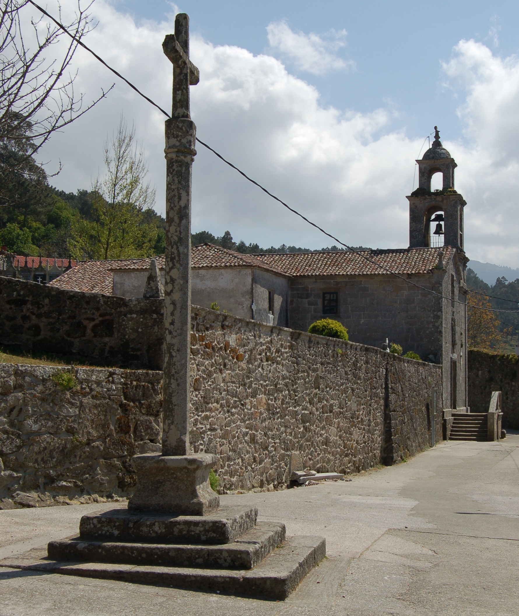 Igrexa parroquial de Boa (Noia).